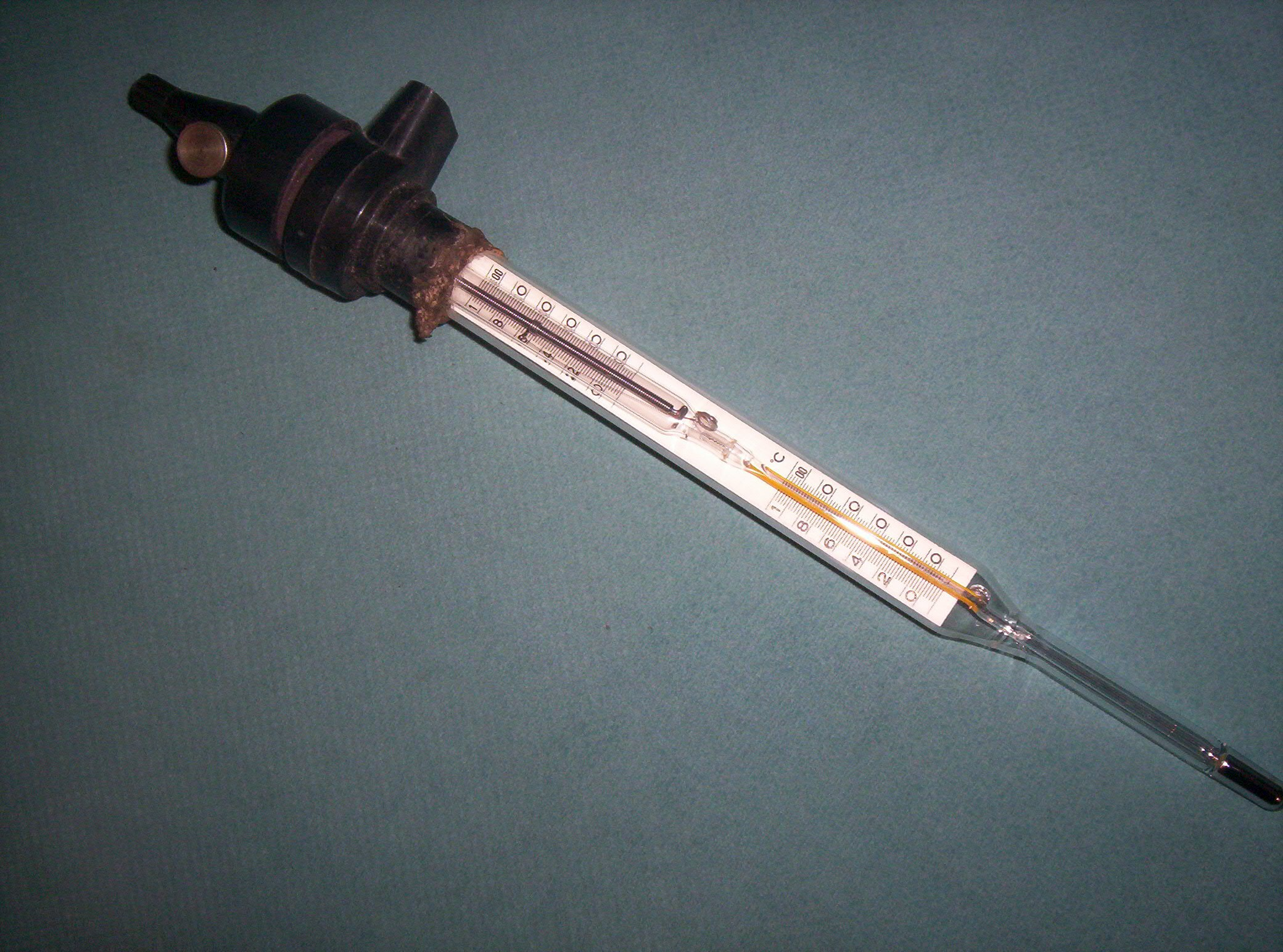 Einstellbares Kontaktthermometer (0…100 °C) mit Schalt- und Isttemperaturskale. Verstellt wird mittels eines aufgesetzten Dauermagneten